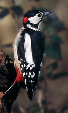 Buntspecht ♂ (Dendrocopos major) - "Buntspecht bei der Fütterung", männlich